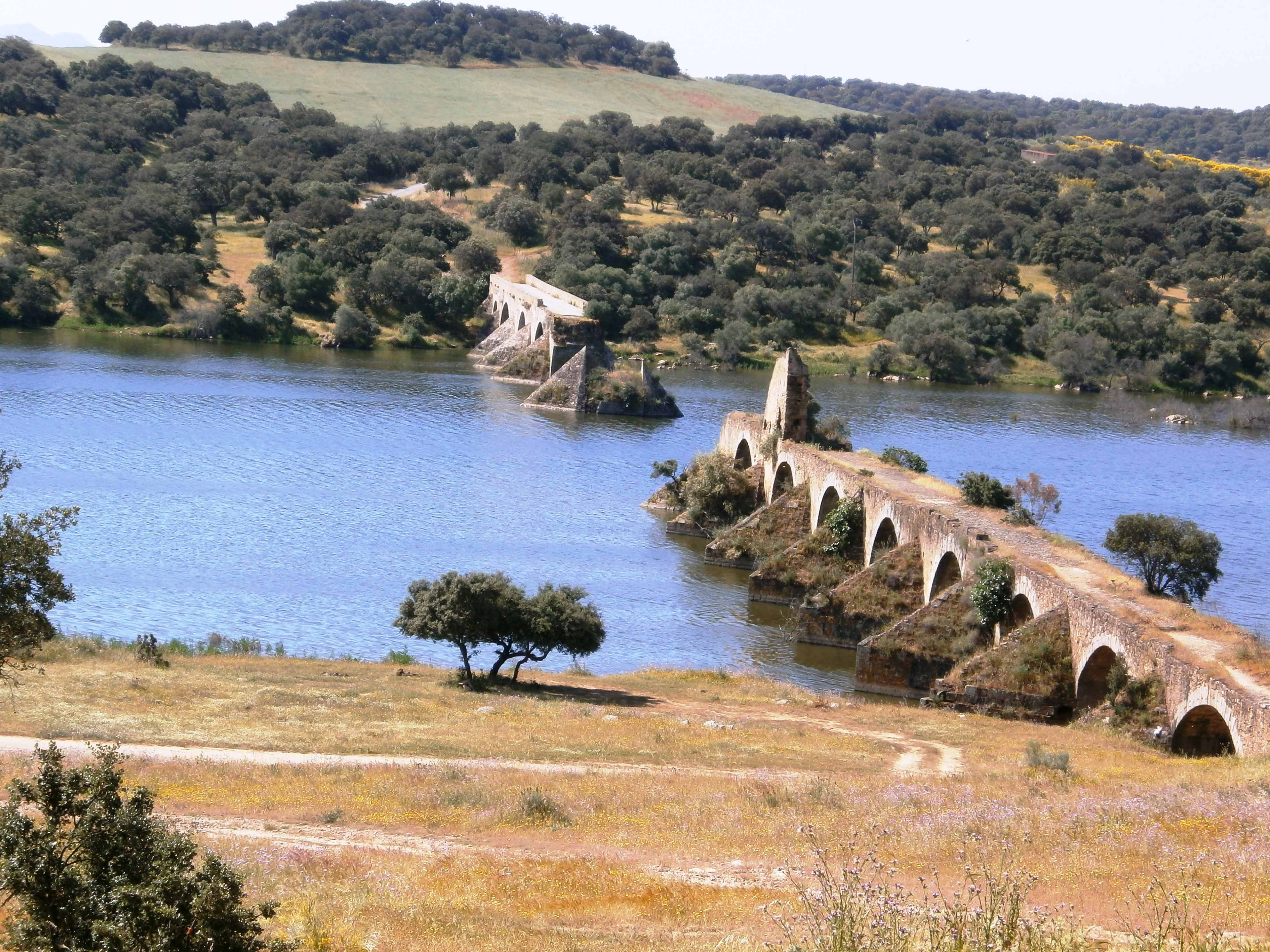 Puente Ayuda antiguo sobre el Guadiana ,fronterizo entre España(Olivenza) y Portugal(Elvas) visto desde Portugal